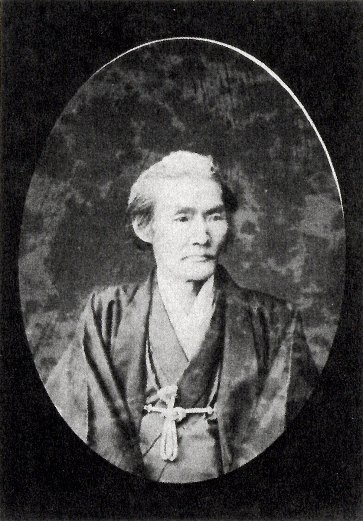 高木正坦の肖像写真。